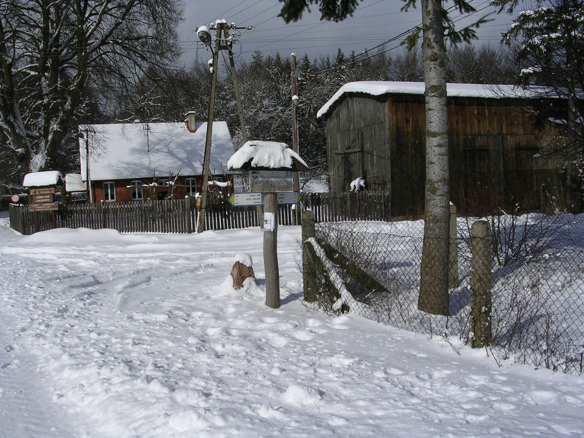 Leśnictwo Gołębiewo, Gdynia.